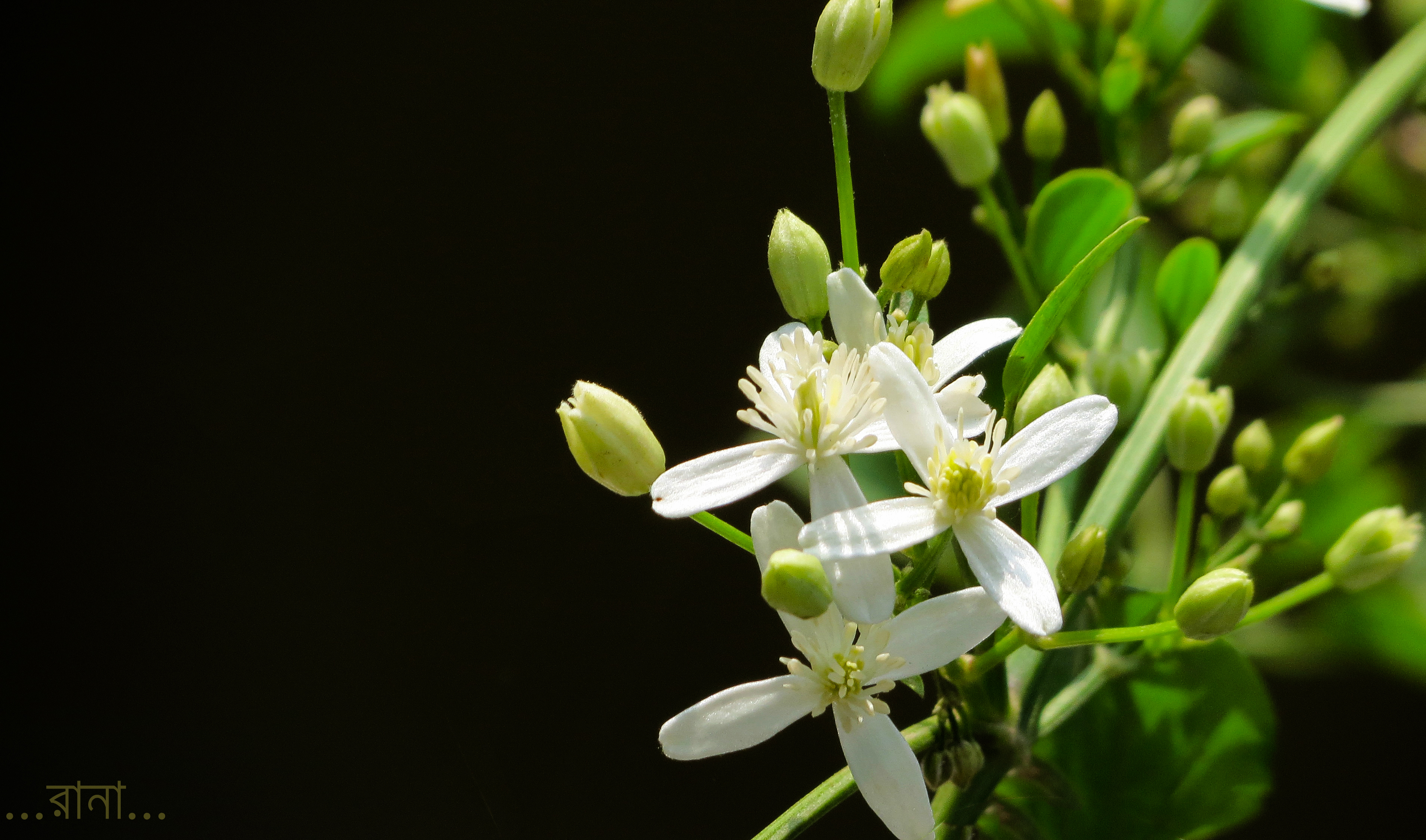 এরোমেটিক জুঁই/ অ্যারোমেটিক জুঁই/ ক্লিমেটিস